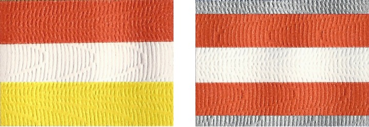 Corpsburschen- und Fuchsenfarben des Corps Marchia (II) Halle